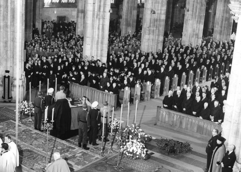 April 1967 Staatsbegräbnis für Alt-Bundeskanzler Dr. Konrad Adenauer (1949 - 1963) Pontifikalrequiem im Kölner Dom